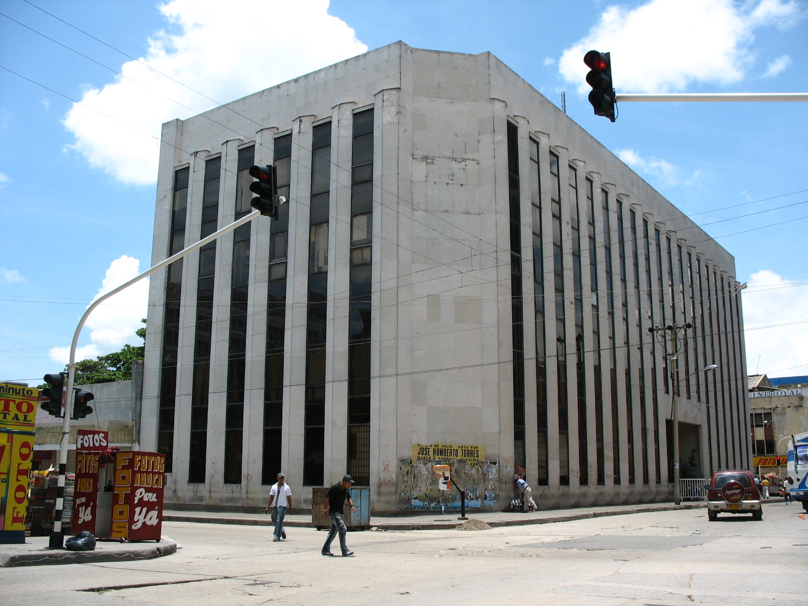 Fiscalía